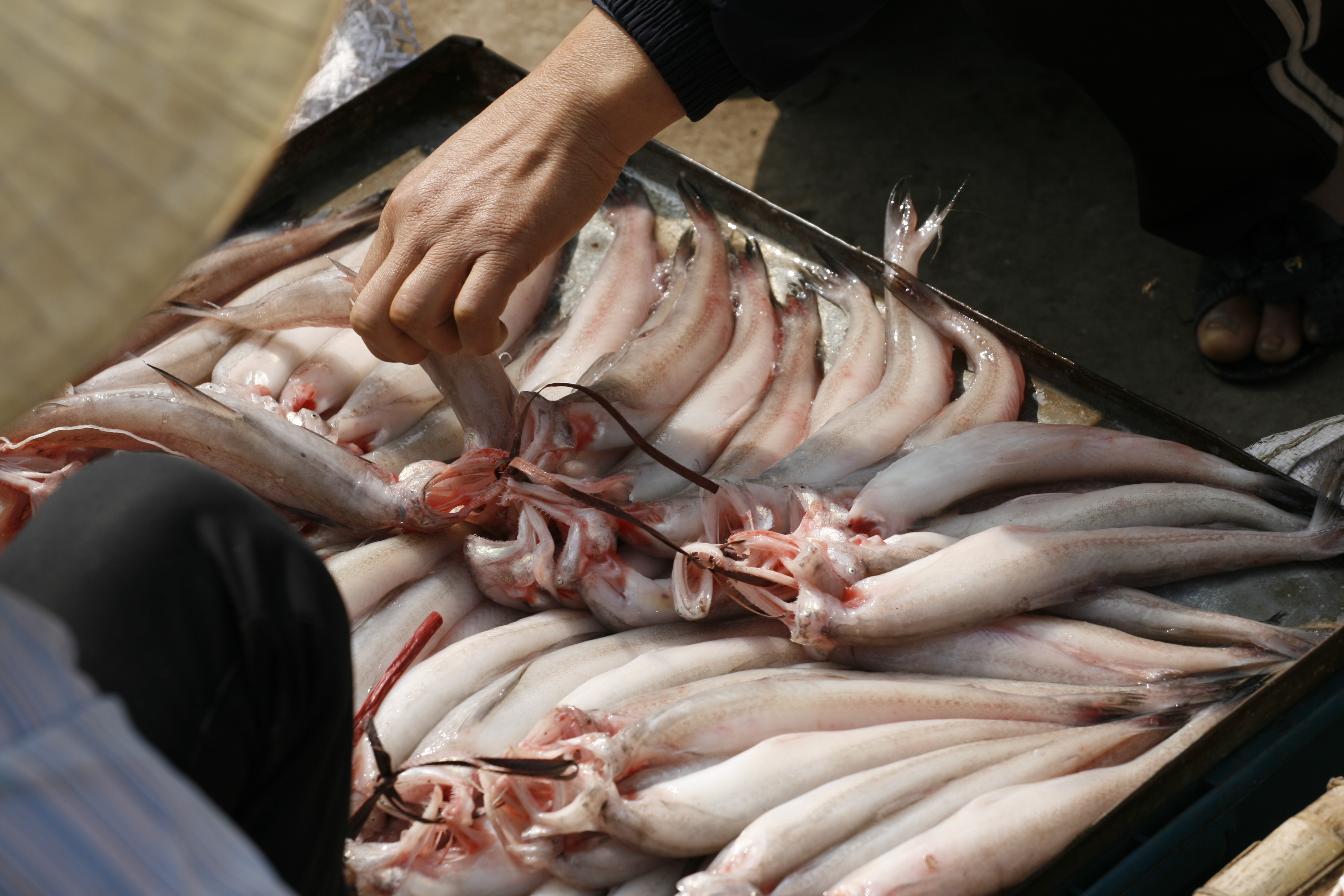 Cá Khoai (Cá cháo) tên khoa học Harpadon nehereus. Thực phẩm khoái khẩu của vùng biển Hậu Lộc, Thanh Hóa